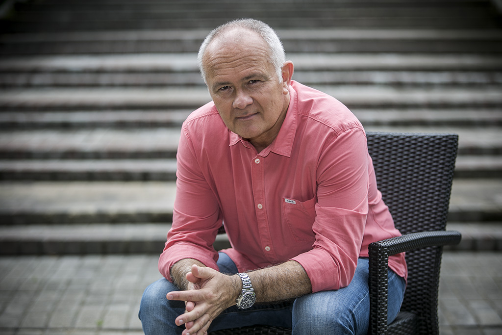 Zsiga Gyula mesteredző